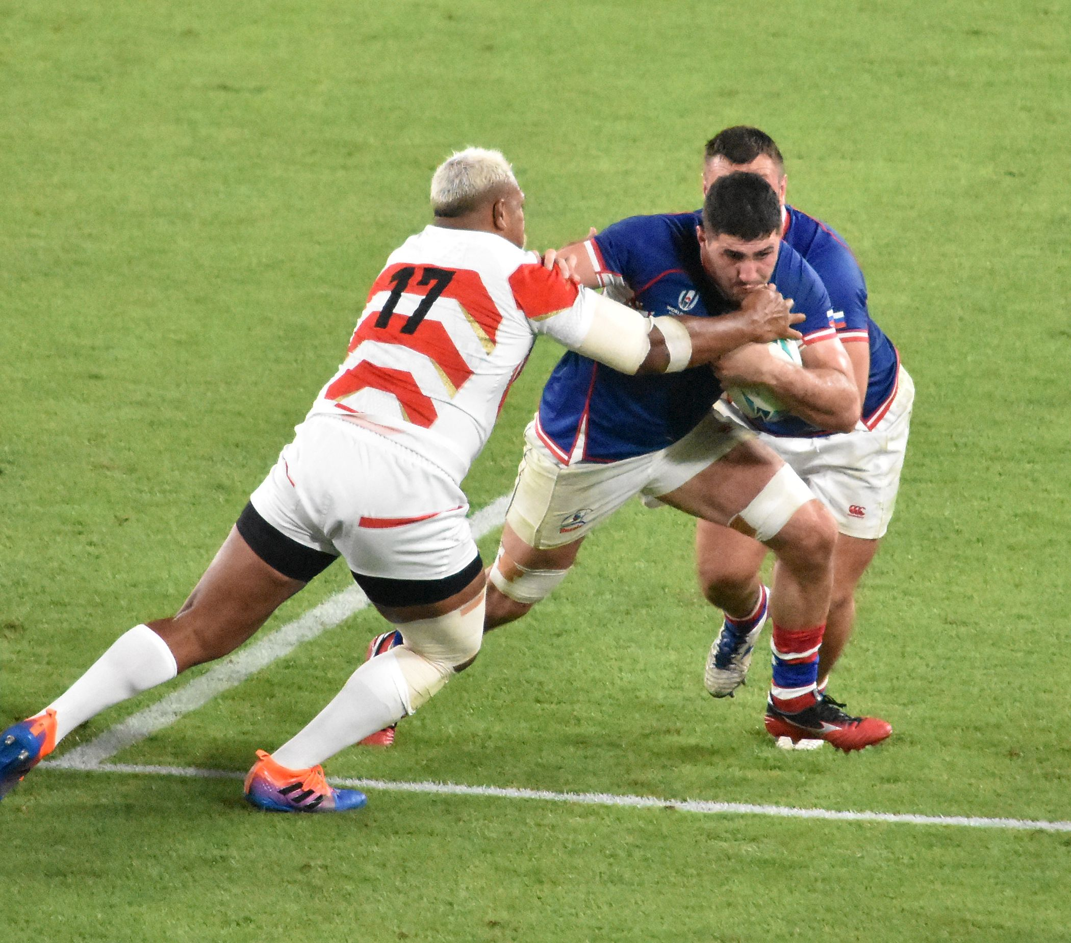 中島イシレリ